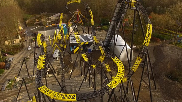 Luchtfoto van de nog niet afgewerkte achtbaan.